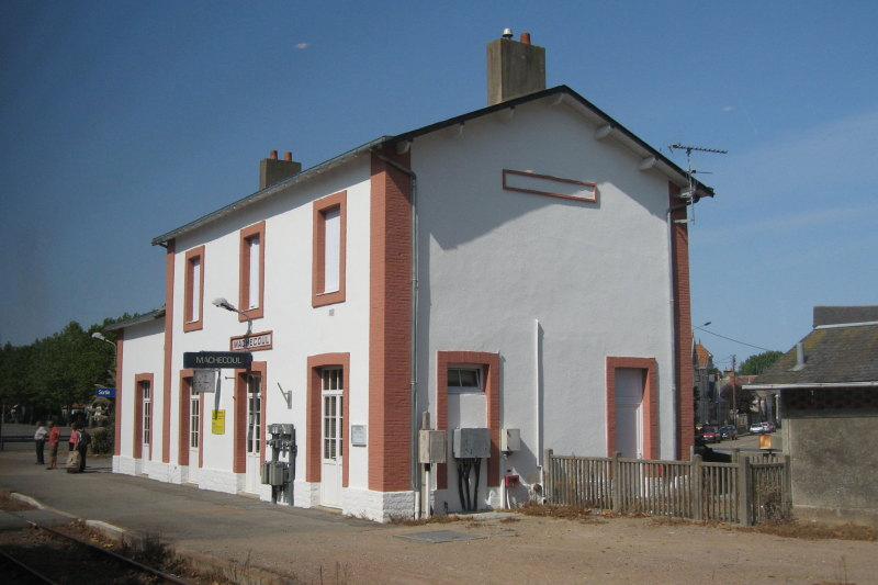 Le bâtiment voyageur de la gare de Machecoul, côté voies, Loire-Atlantique, France.